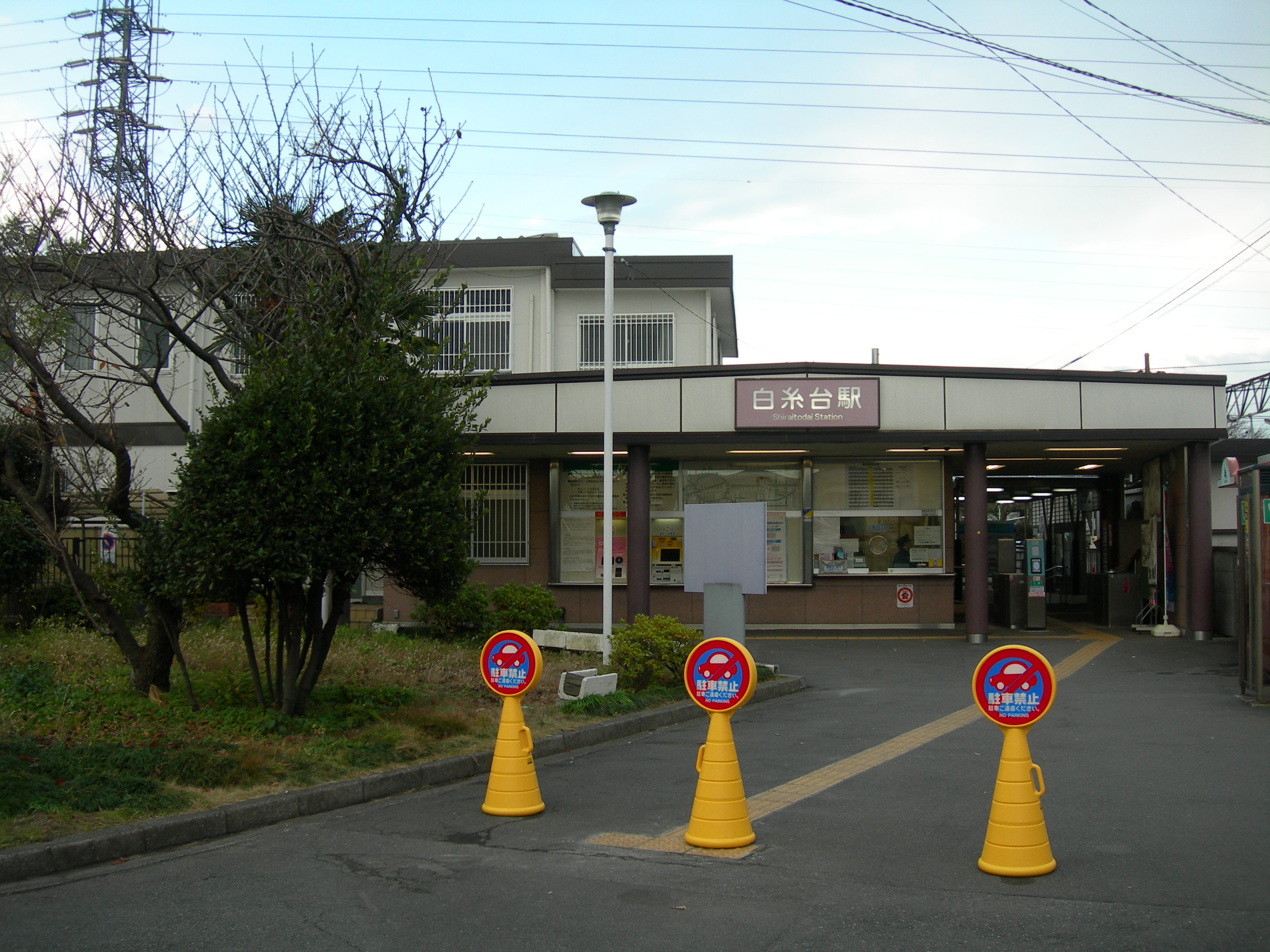 西武多摩川線白糸台駅駅舎